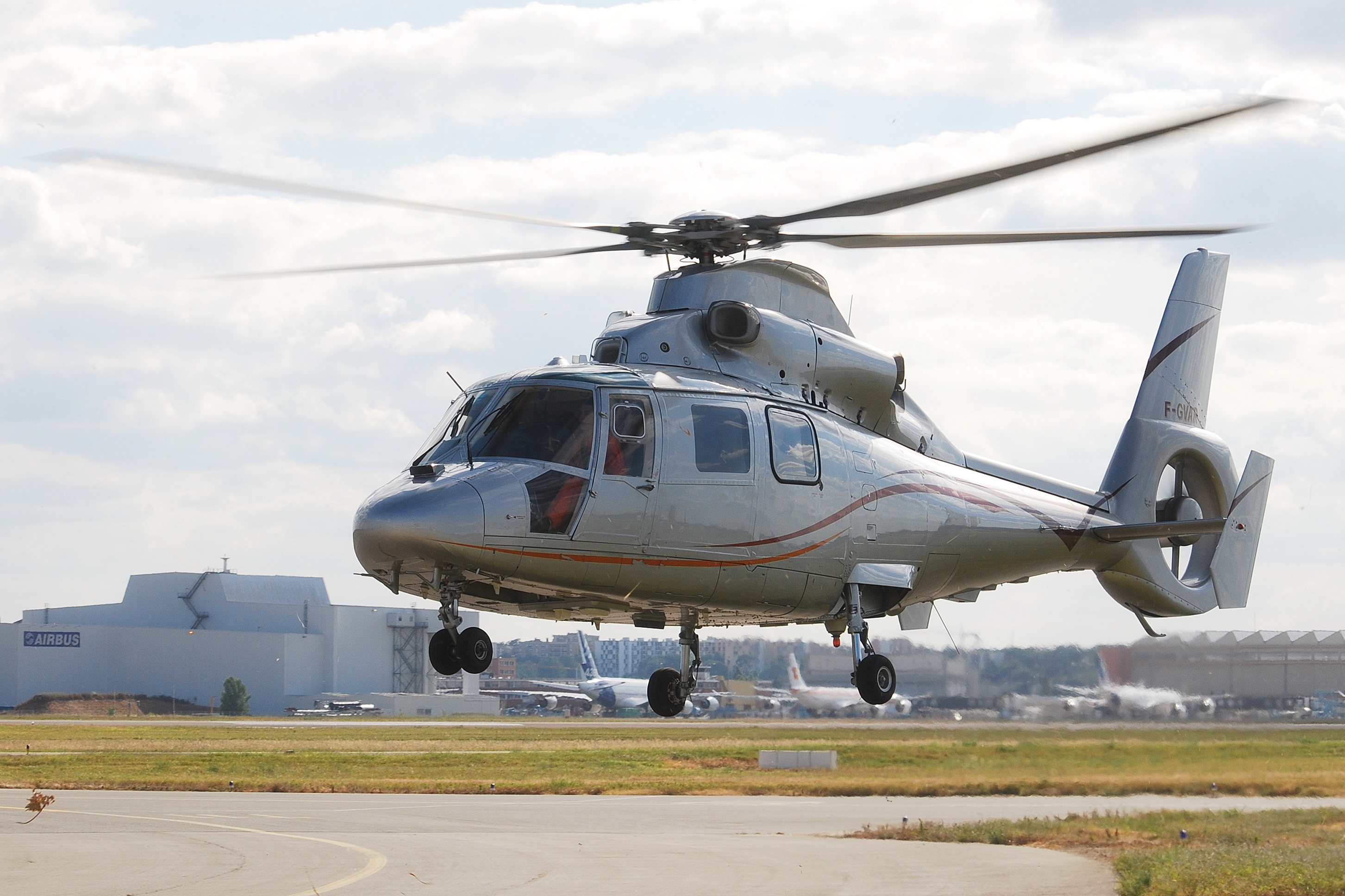 Photo prise à l'aéroport de Toulouse-Blagnac (LFBO) en France. Picture take at Toulouse-Blagnac Airport (LFBO) in France.